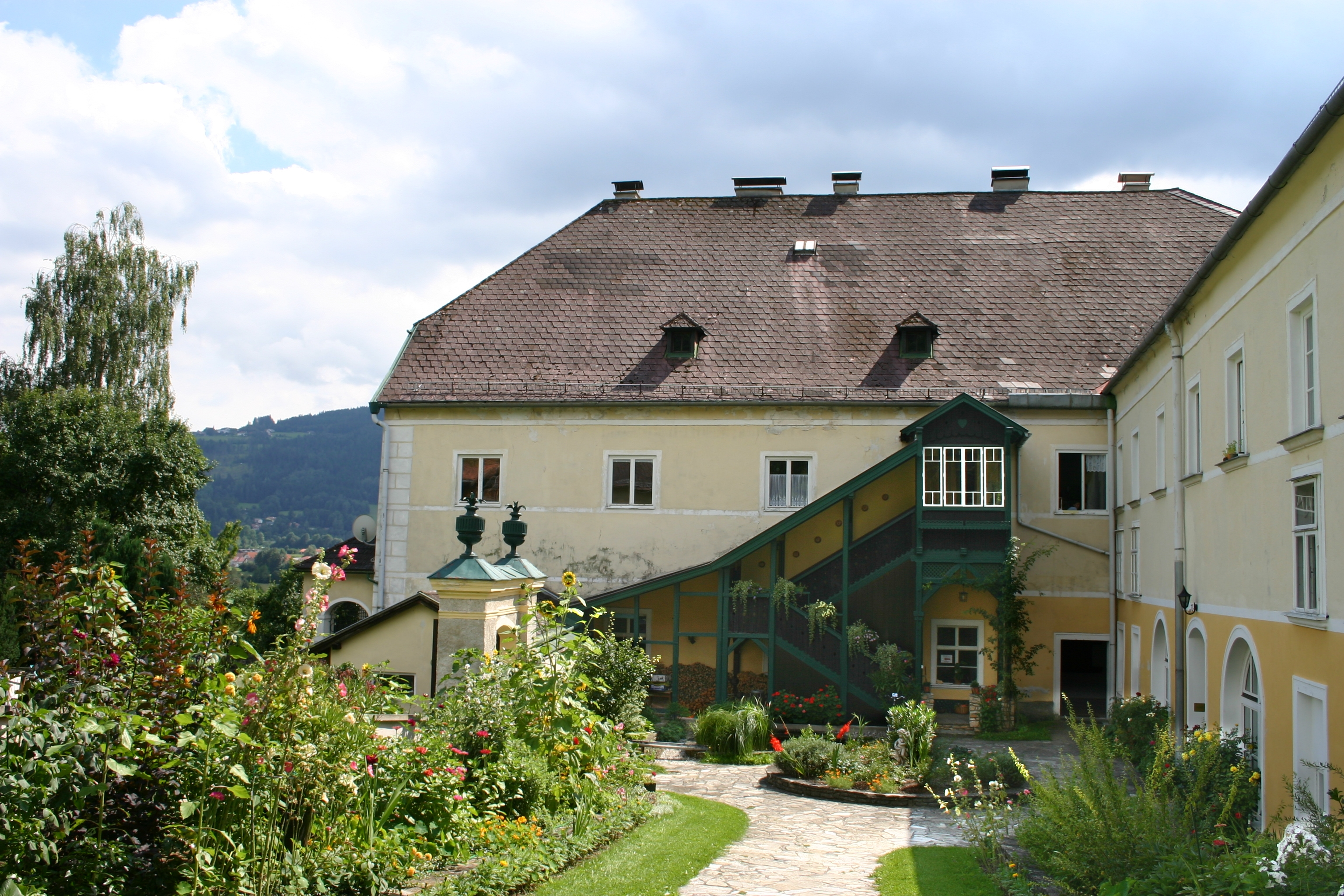 Kirchberg am Wechsel Dominikanerinnen-Kloster (Bild 2)